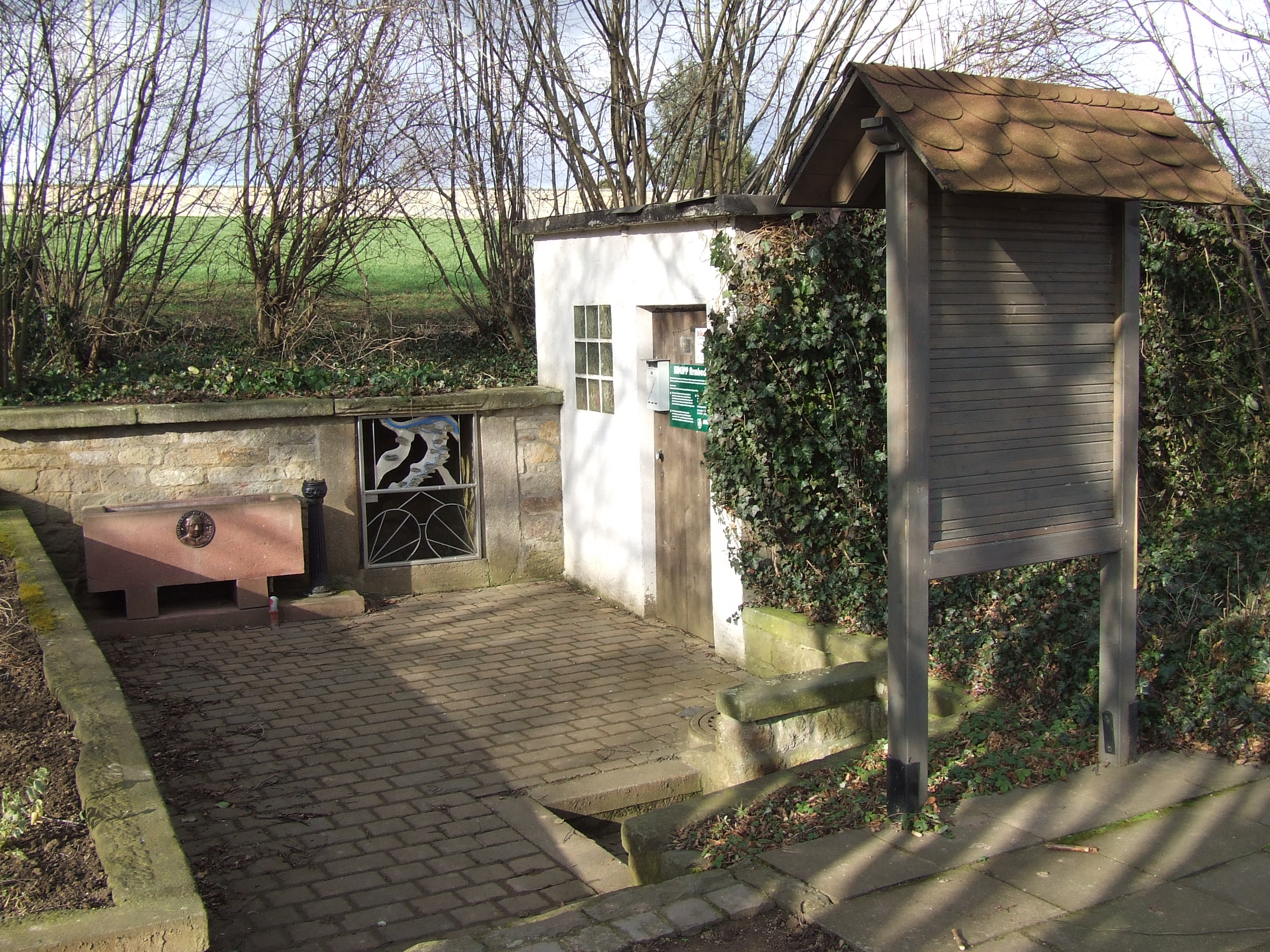 Selz (River), Selz (Fluss)